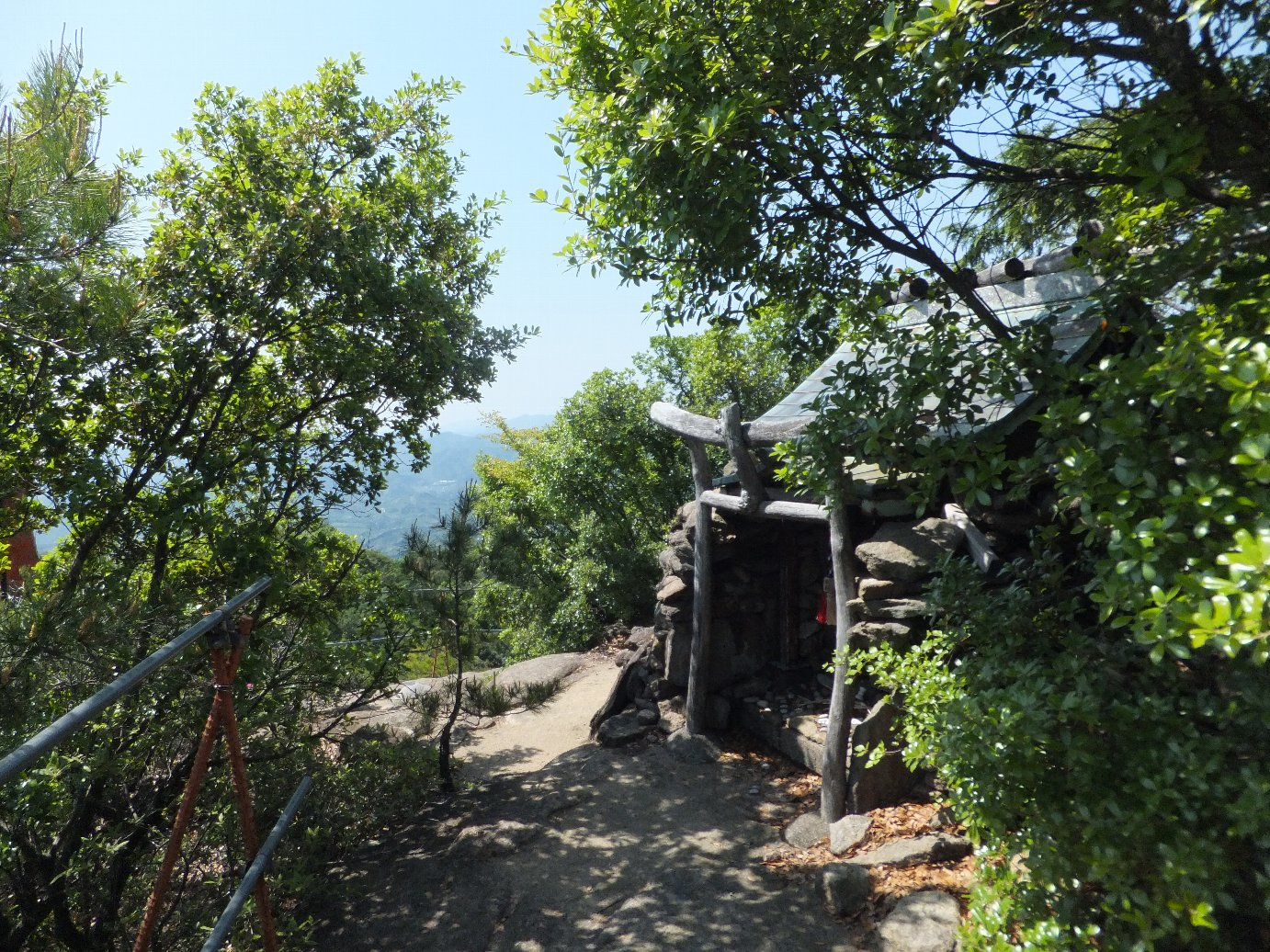 和歌山県田辺市上秋津 龍神山の八幡宮